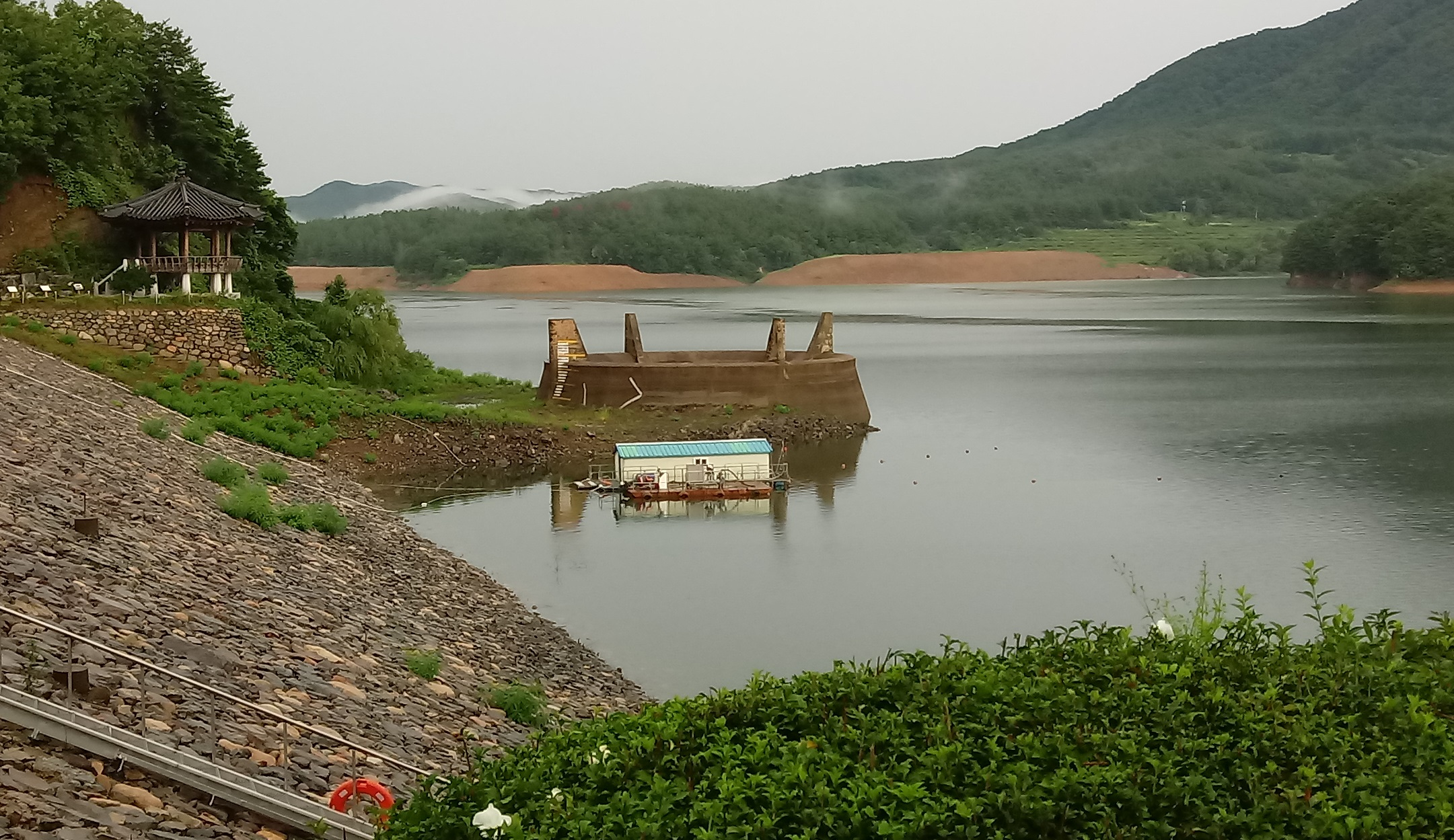 덕동저수지 모닝글로리 여수로